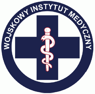 Wojskowy Instytut Medyczny – oznaka rozpoznawcza – 2012, Polska.